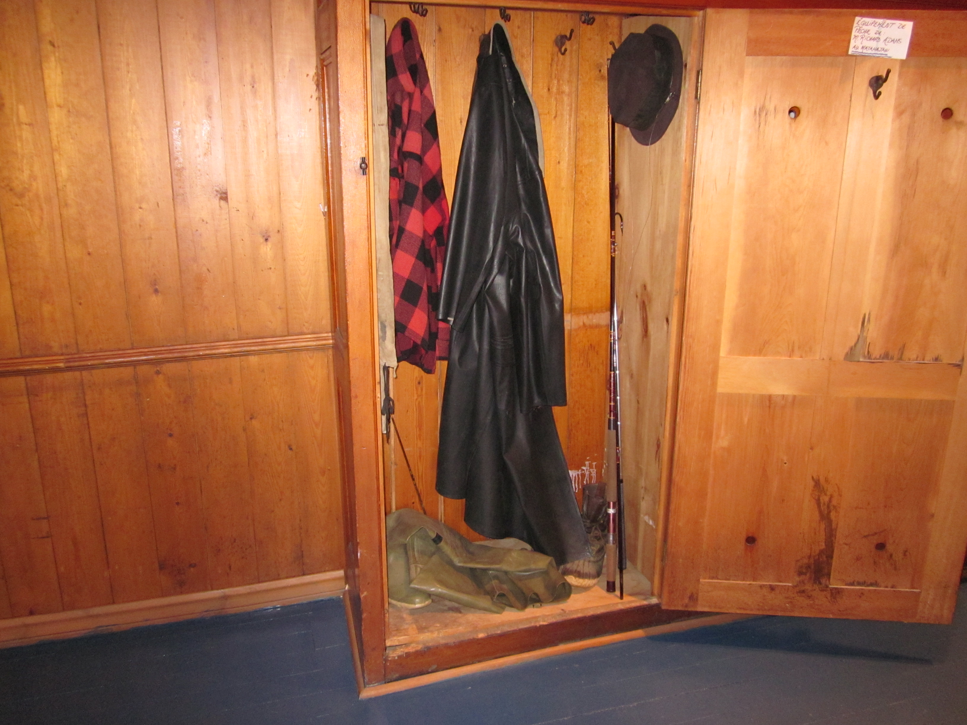 Vêtements de travail de Richard Adams au site de pêche Matamajaw